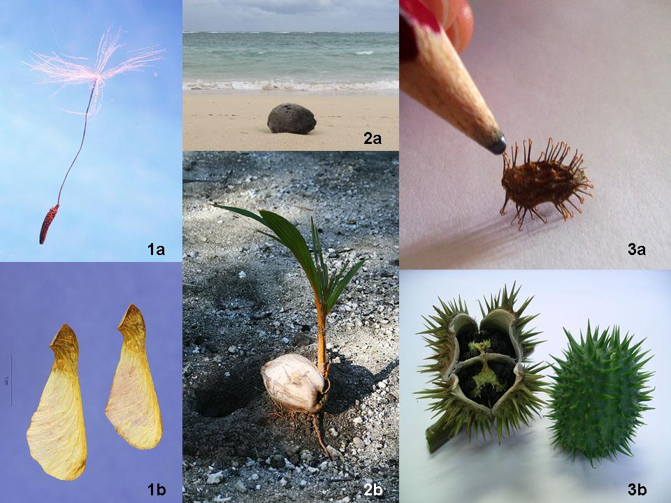 Tres modos diferentes de dispersión de los frutos. Anemocoria en una cipsela de Taraxacum (1a) y en sámaras de Acer (1b). Los frutos del cocotero (Cocos nucifera) son un ejemplo de hidrocoria, de dispersan flotando sobre el agua, arribando a nuevas playas (2a) donde la semilla germina (2b). La dispersión por animales o zoocoria es auxiliada por la presencia de ganchos, como los que se observan en la cipsela de Xanthium spinosum (3a) o en la cápsula de Datura stramonium (3b).